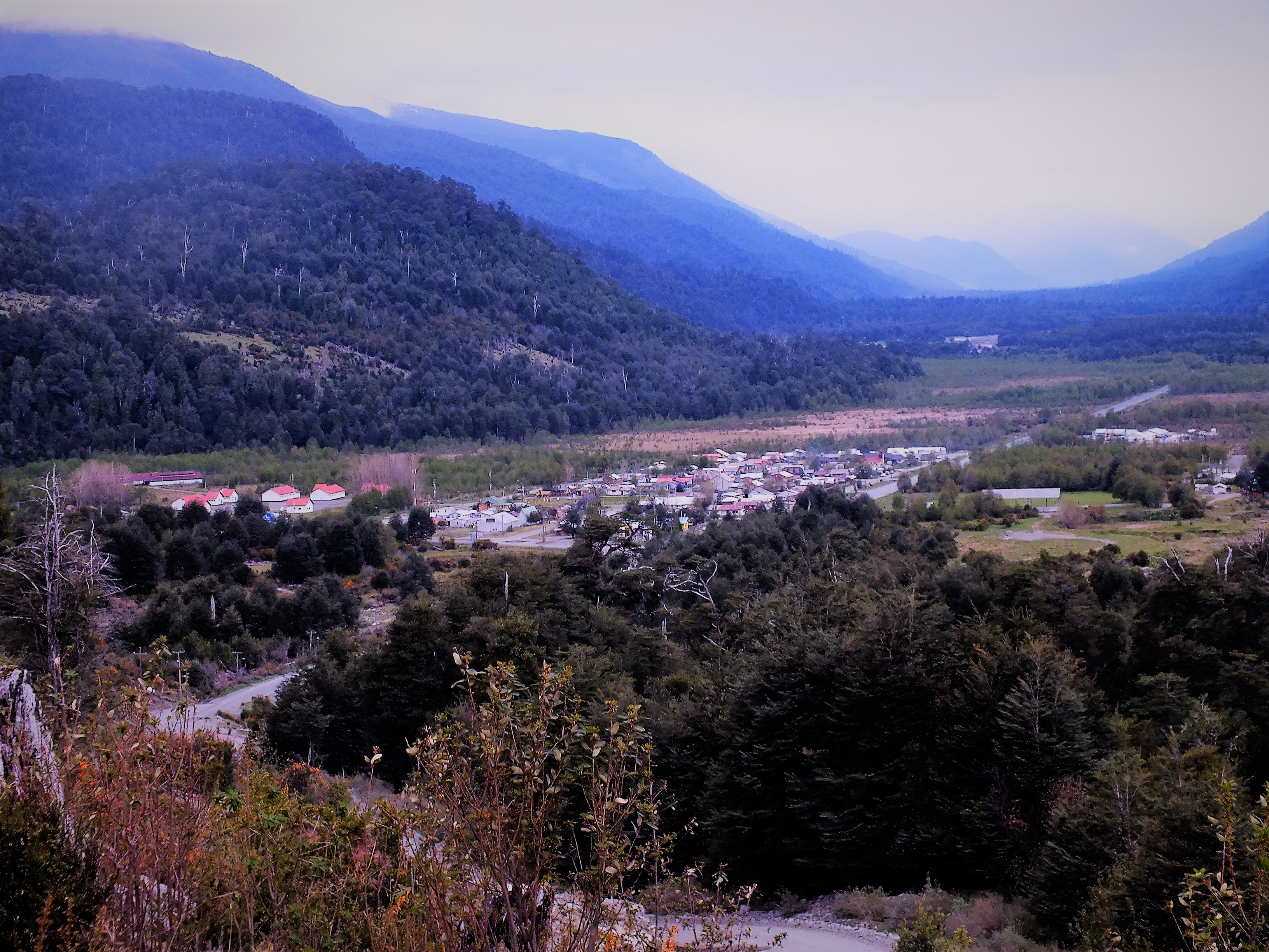 Villa Santa Lucía - Valle del río Frio